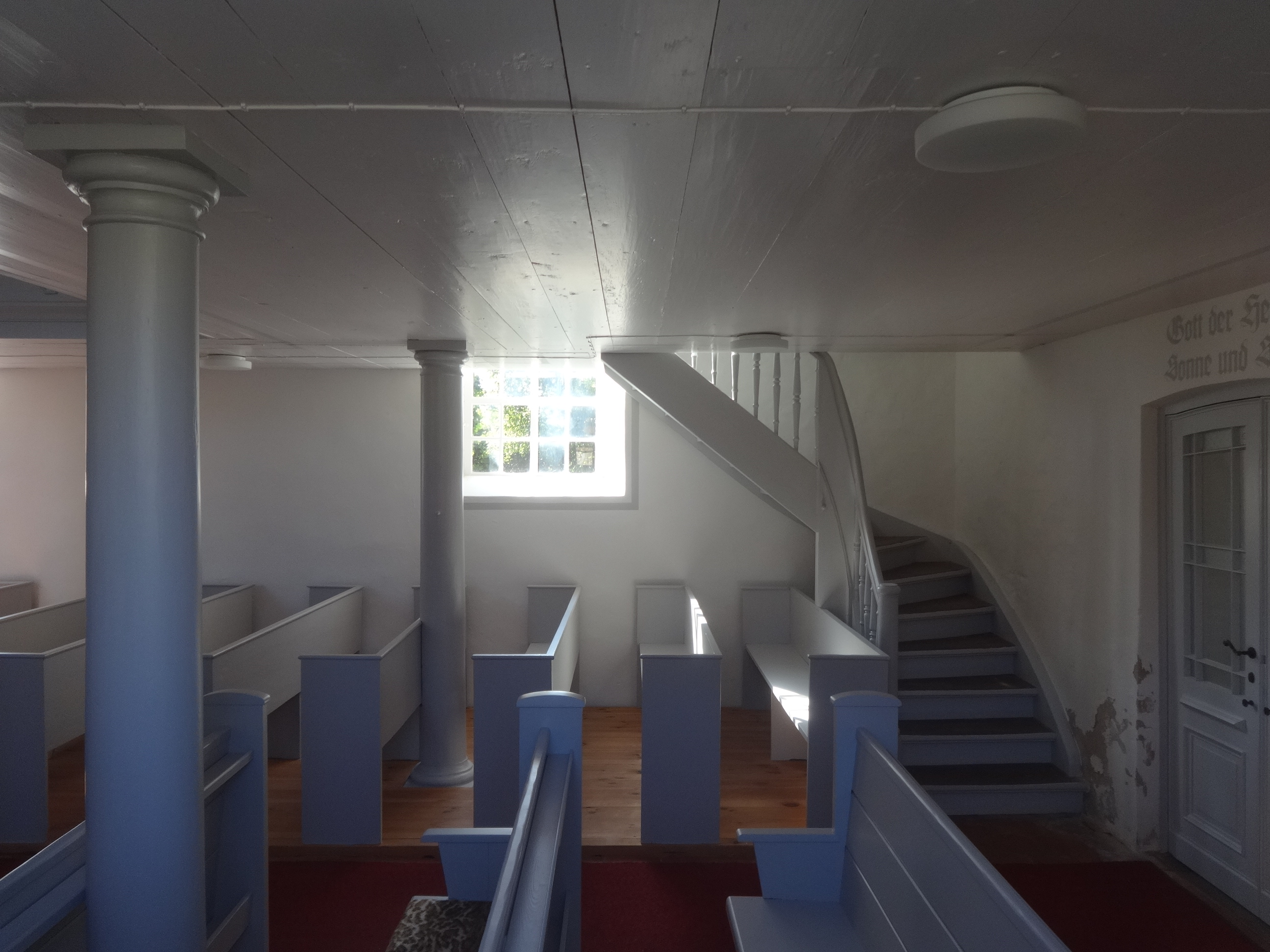 Die Feldsteinkirche wurde in der zweiten Hälfte des 13. Jahrhunderts erbaut. Im 15. Jahrhundert kam der Westturm hinzu, der 1753 einen Aufsatz erhielt. In seinem Innern befinden sich unter anderem ein Altar aus dem Anfang des 18. Jahrhunderts sowie eine Fünte aus dem 19. Jahrhundert.